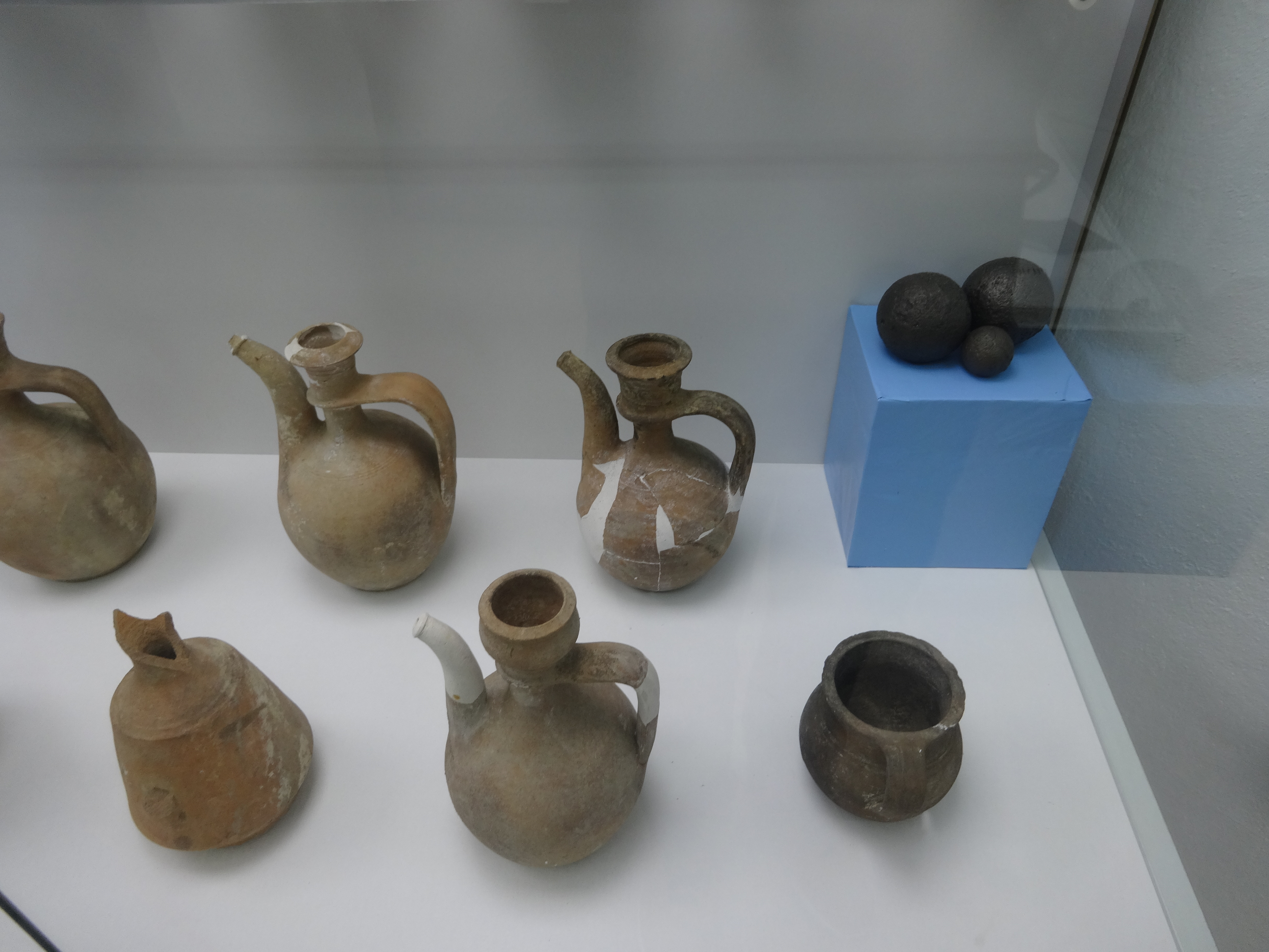 Muzej u Pirotu, eksponati su prikupljani na području tvrđave